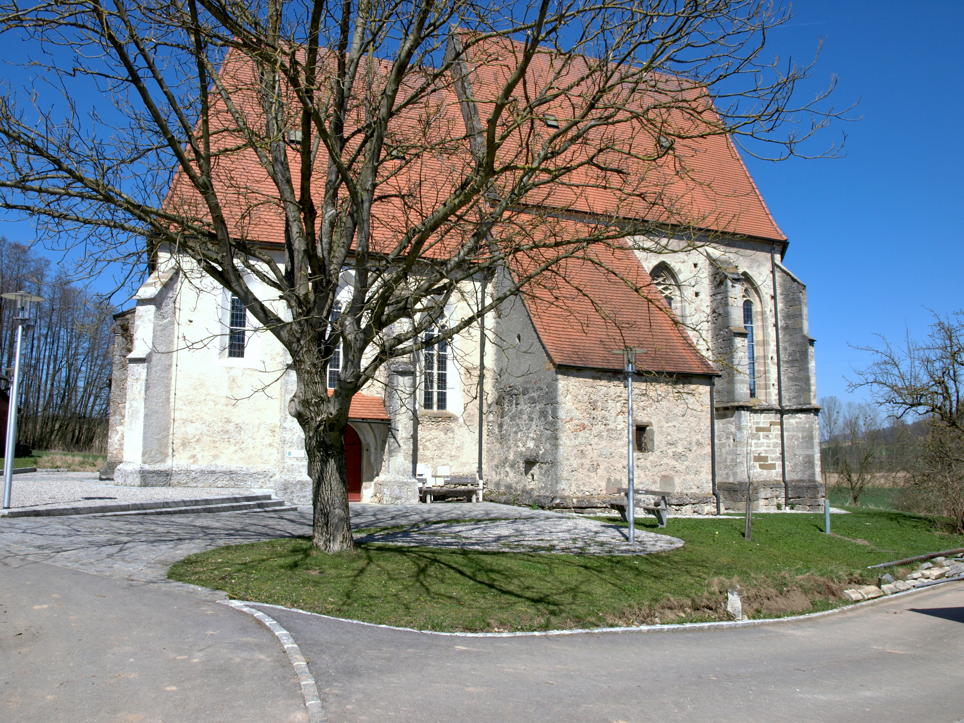 Kath. Filialkirche hl. Wolfgang